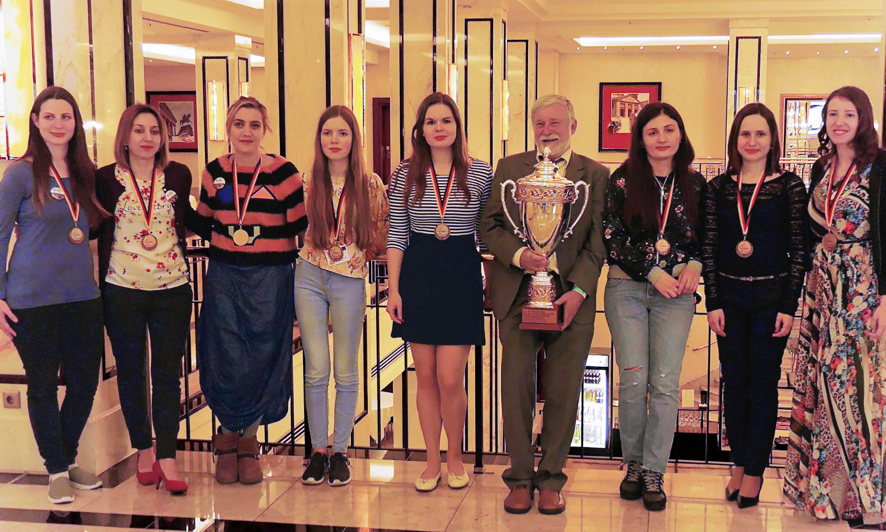 SK Schwäbisch Hall, Sieger der deutschen Schachbundesliga der Frauen, Finalrunden der deutschen Schachbundesliga 2017 in Berlin.